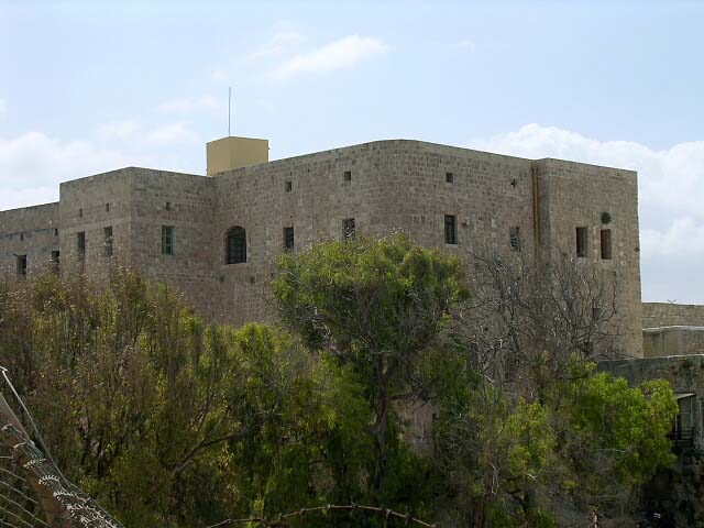 Baha'u'llah's prison cell